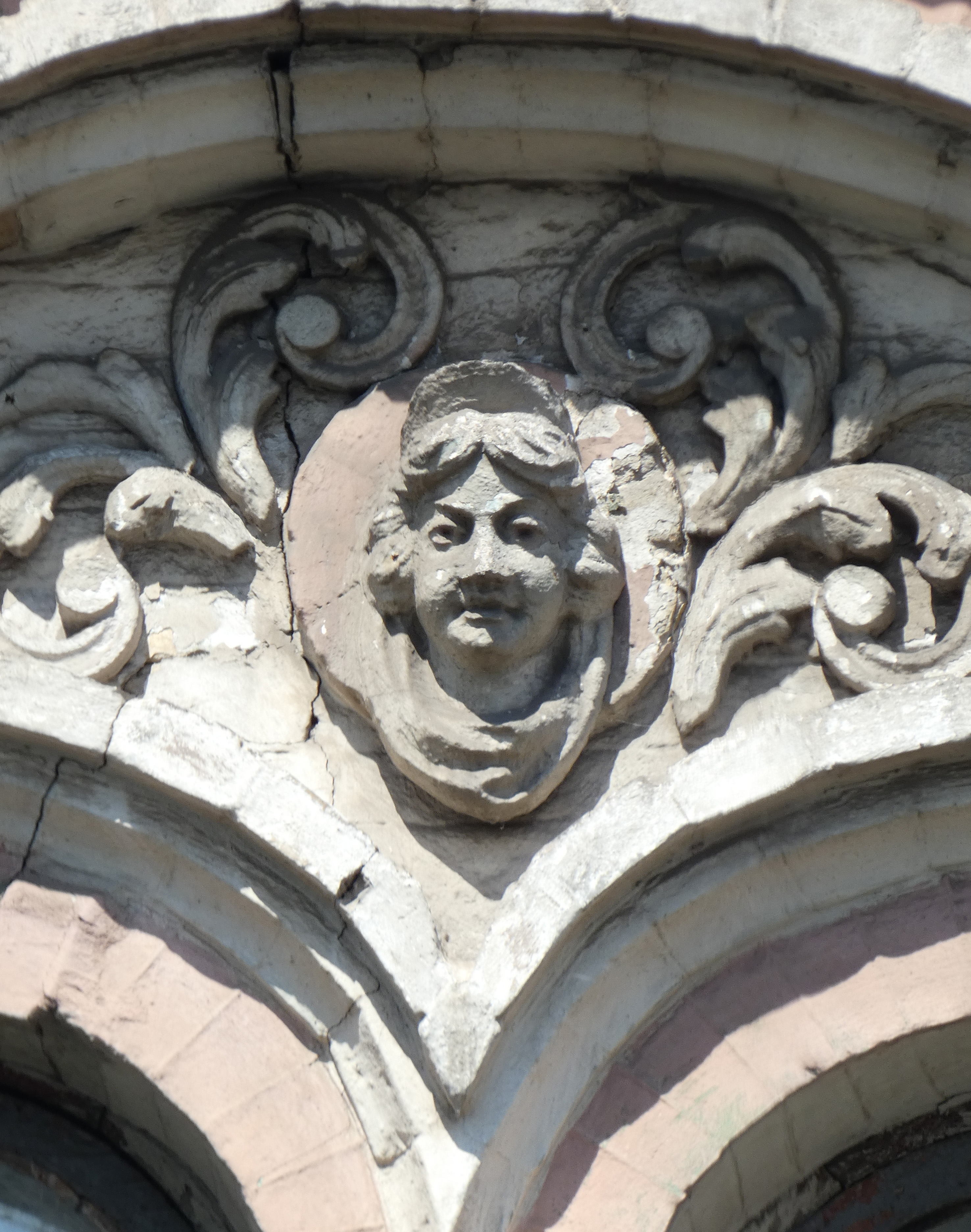 Маскарон. Будинок Вертипороха, Київ, Межигірська вул., 33/19